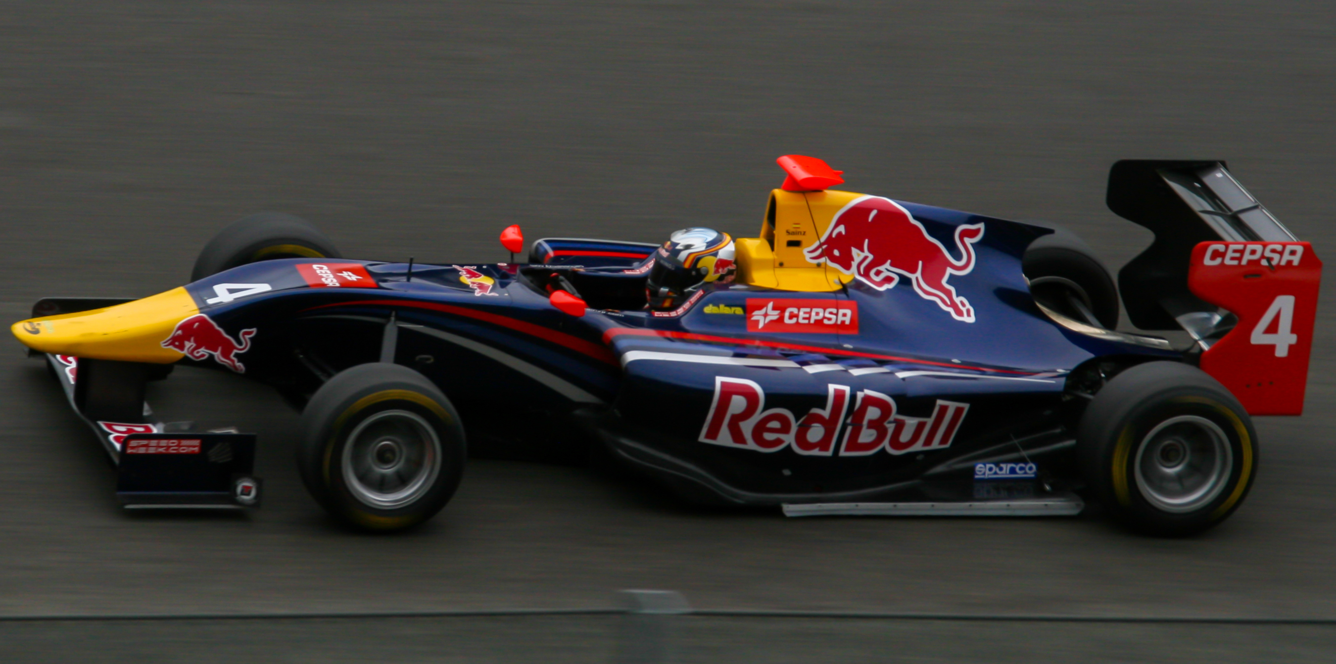 Carlos Sainz junior beim Sprintrennen der GP3 ind Belgien 2013.